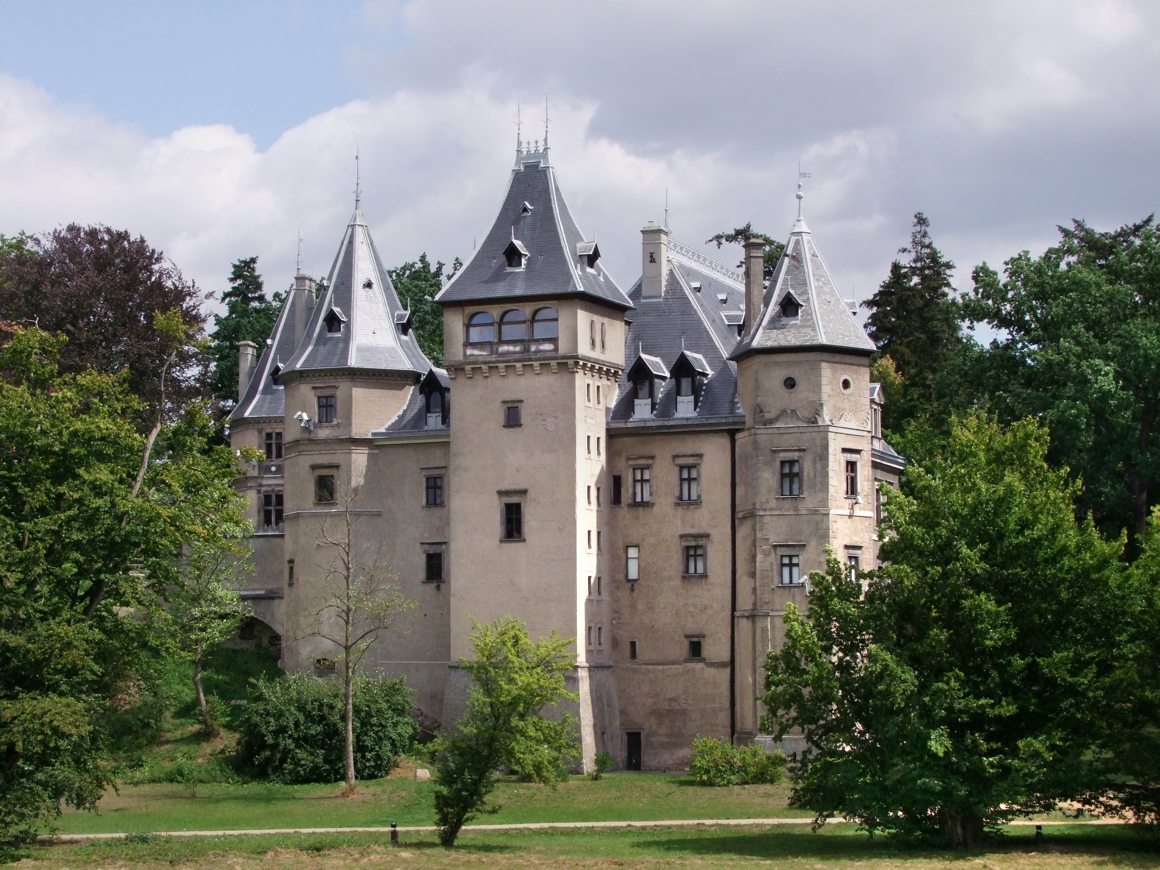 zespół zamkowy: zamek z 1560 r., XVII w., 1872-1875 Gołuchów